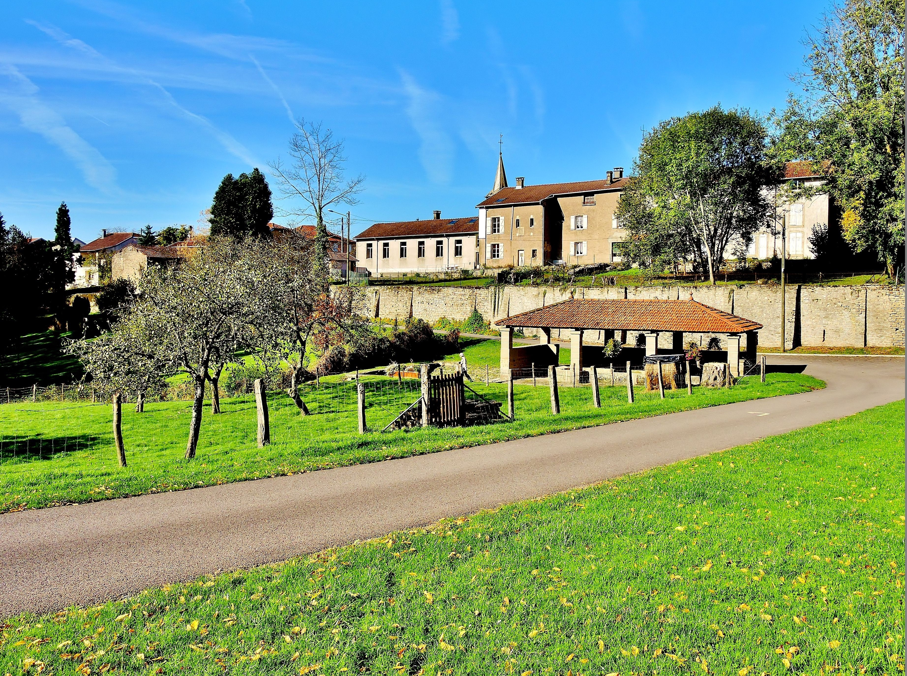 Panorama sur le village,,depuis la source de la Saône. Vioménil. Vosges.